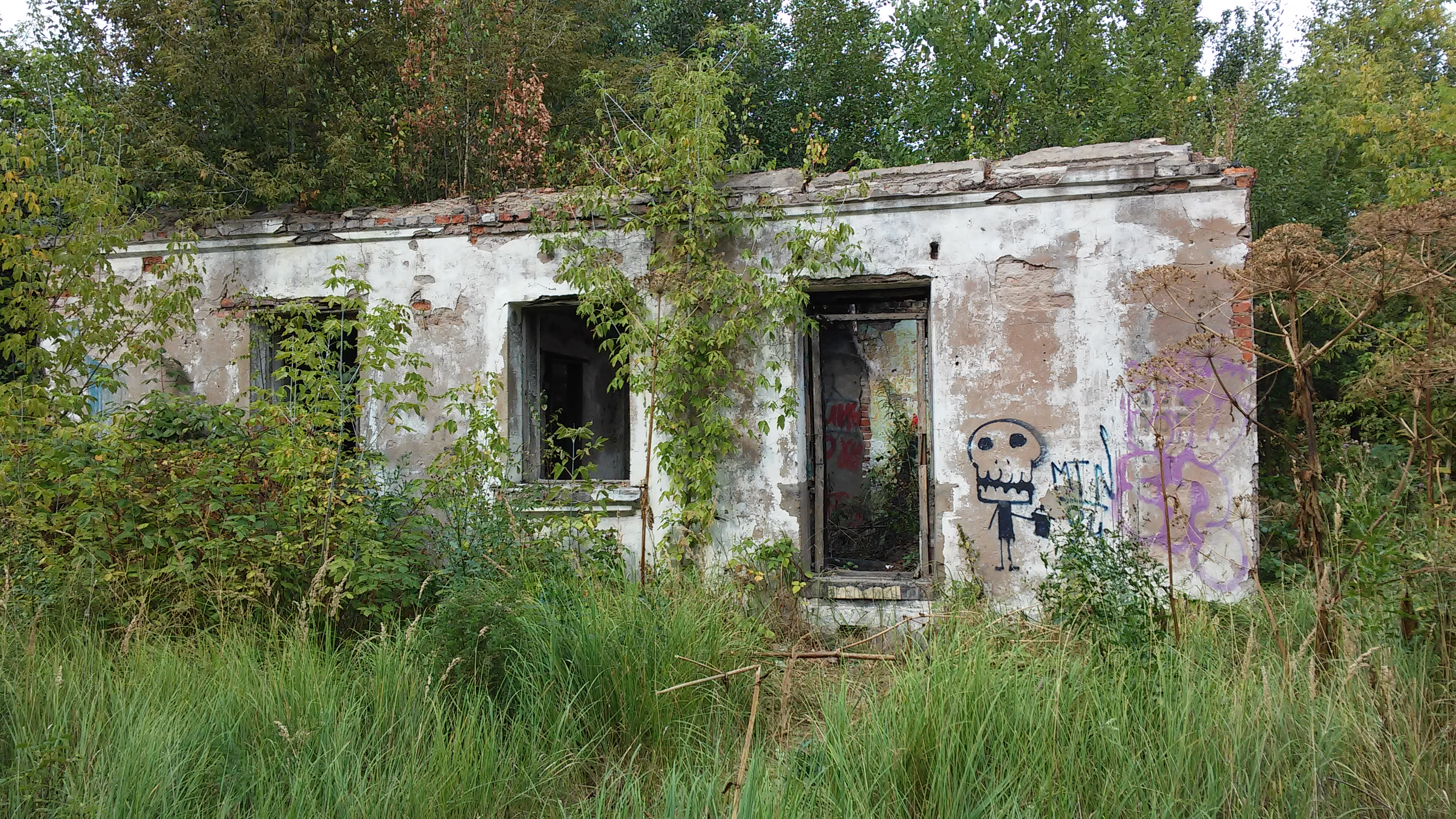 Мінск. Колішняя вёска Вількаўшчына